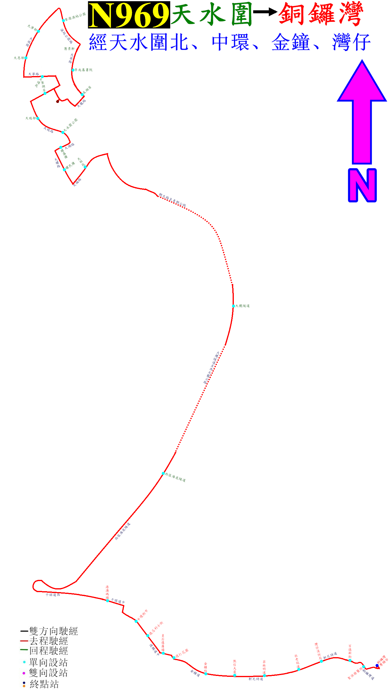 中文（香港）: 過海隧巴N969線的走線圖